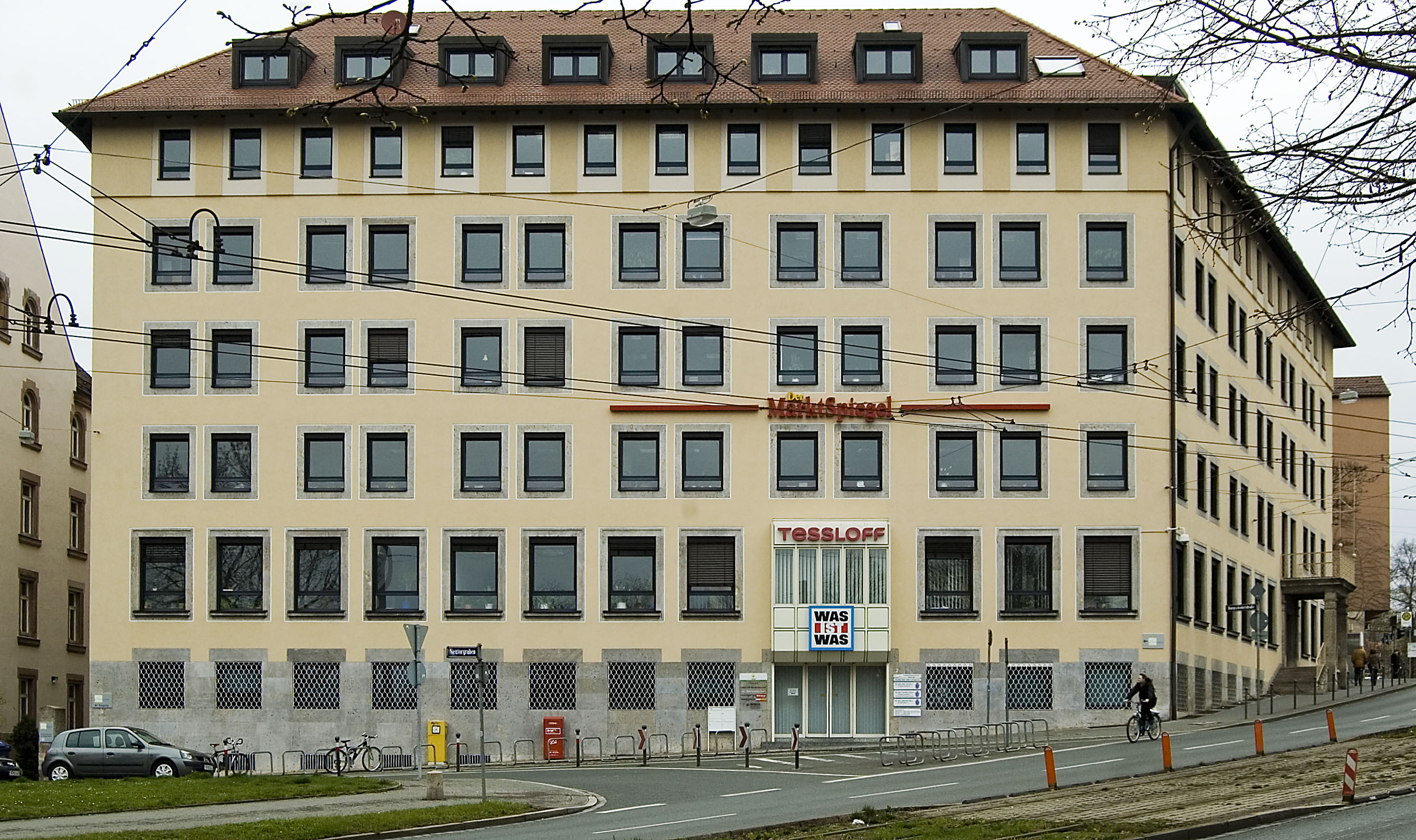 TESSLOFF Verlagsgebäude